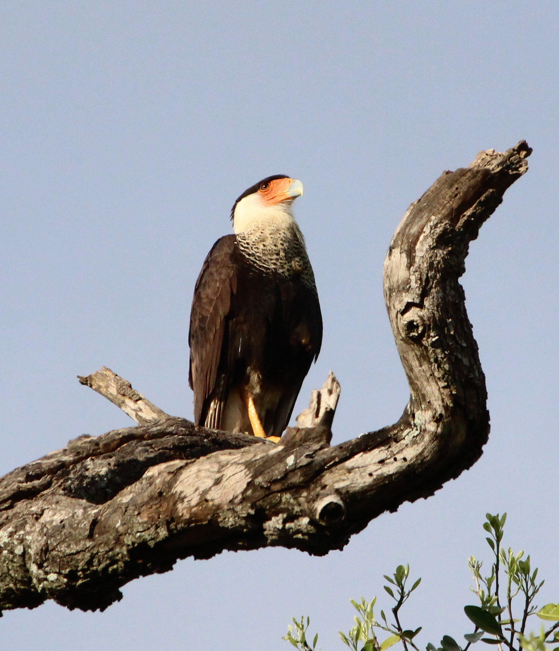 Foto tomada en Ciudad Victoria, Tamaulipas, México.